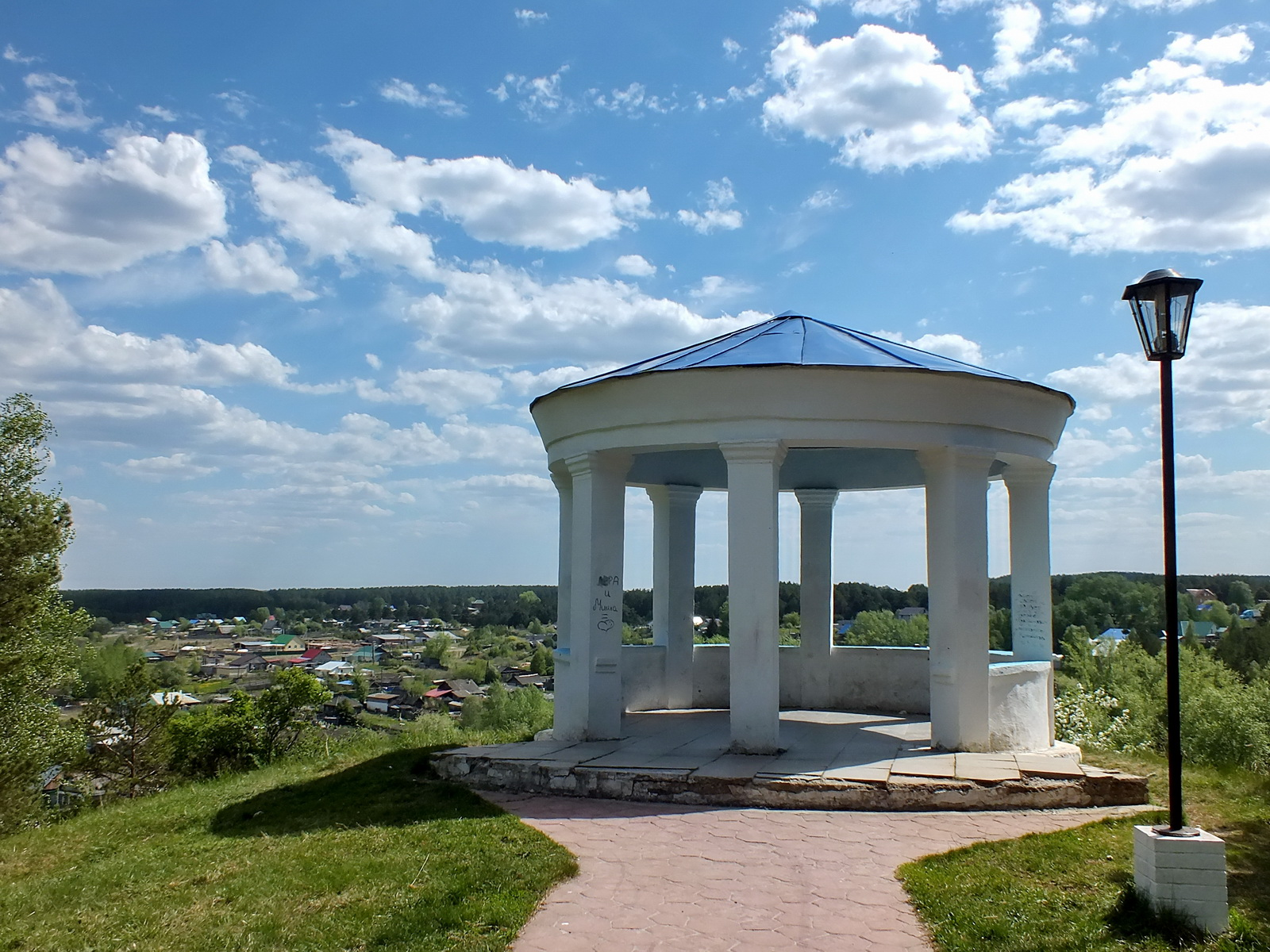 Скала Три сестры: Сухоложский район, Свердловская область This image is related to the protected area of Russia number 6610620